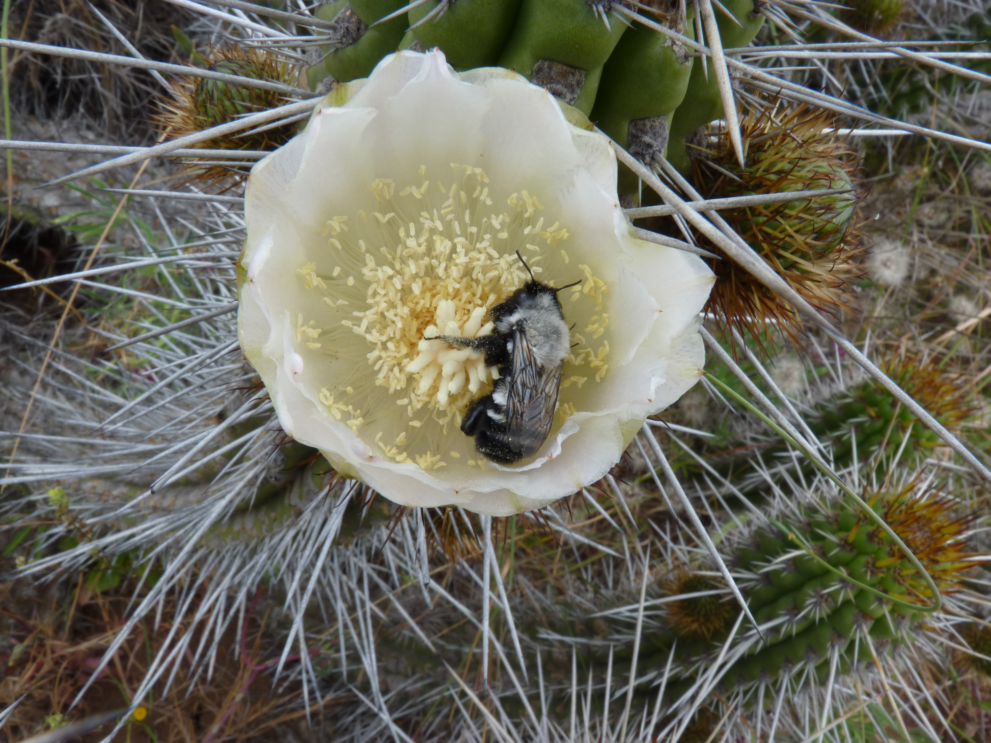 abeja endémica Caupolicana sp, haciendo de las suyas en un aflor de Eulychnia. Los Vilos, ultimos estertores del desierto florido